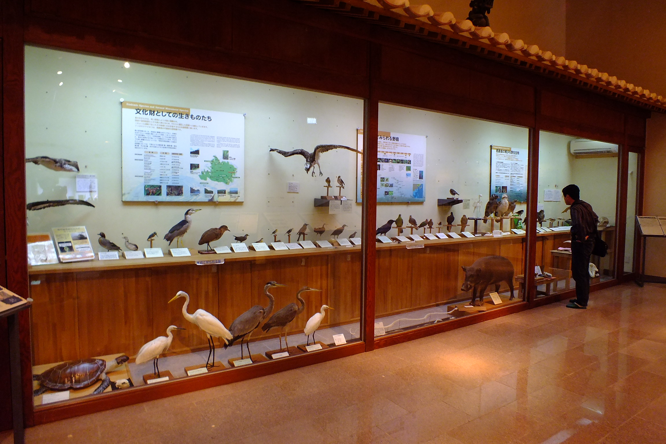 2017-01-29 Iriomote-yasei-hogo-center 西表野生生物保護センター